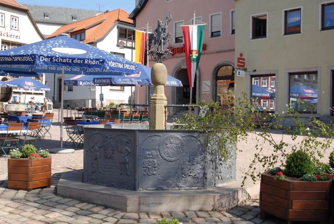 Bischofsheim, "Stadtbrunnen" / city-font